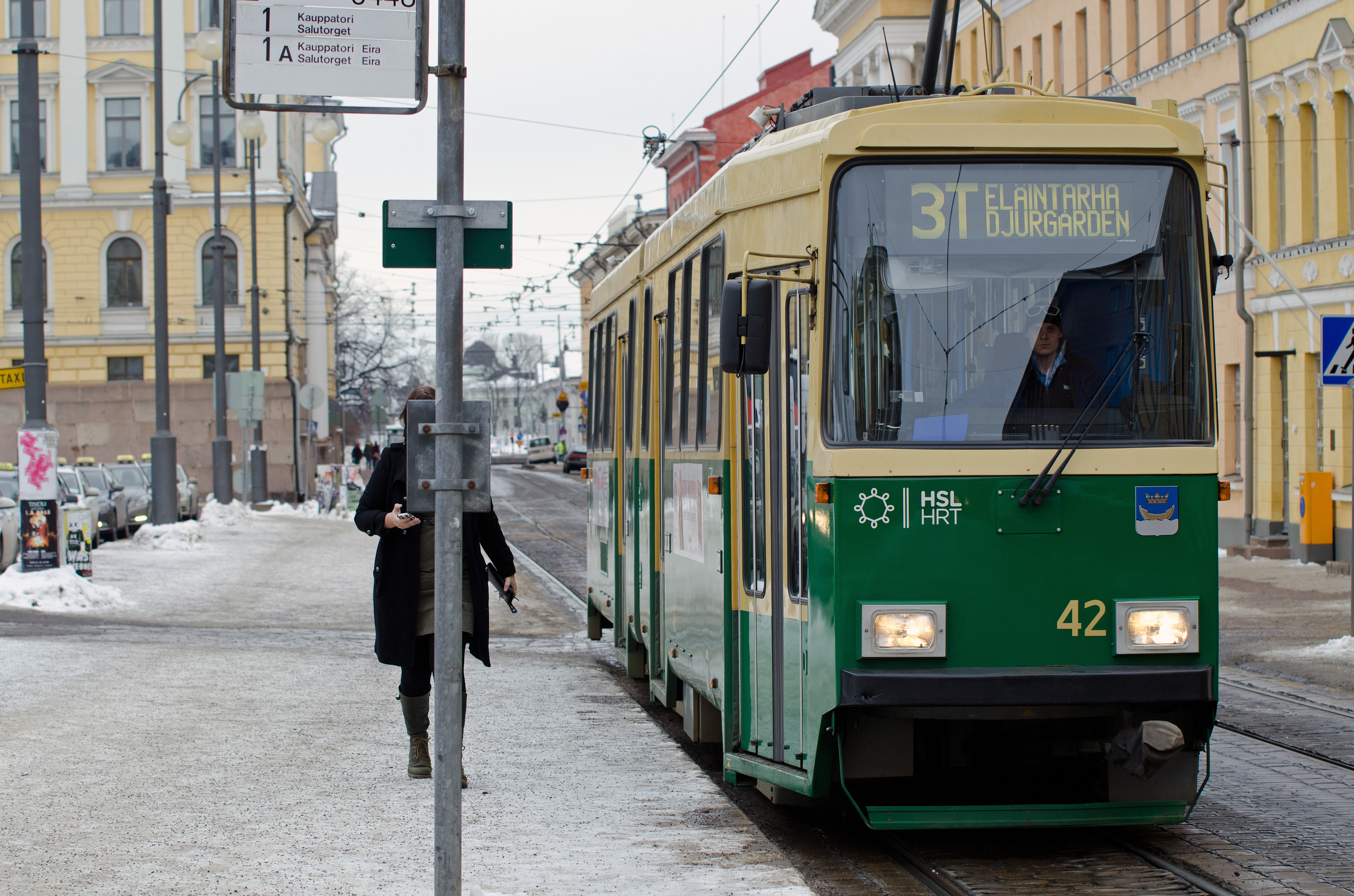 Helsinki